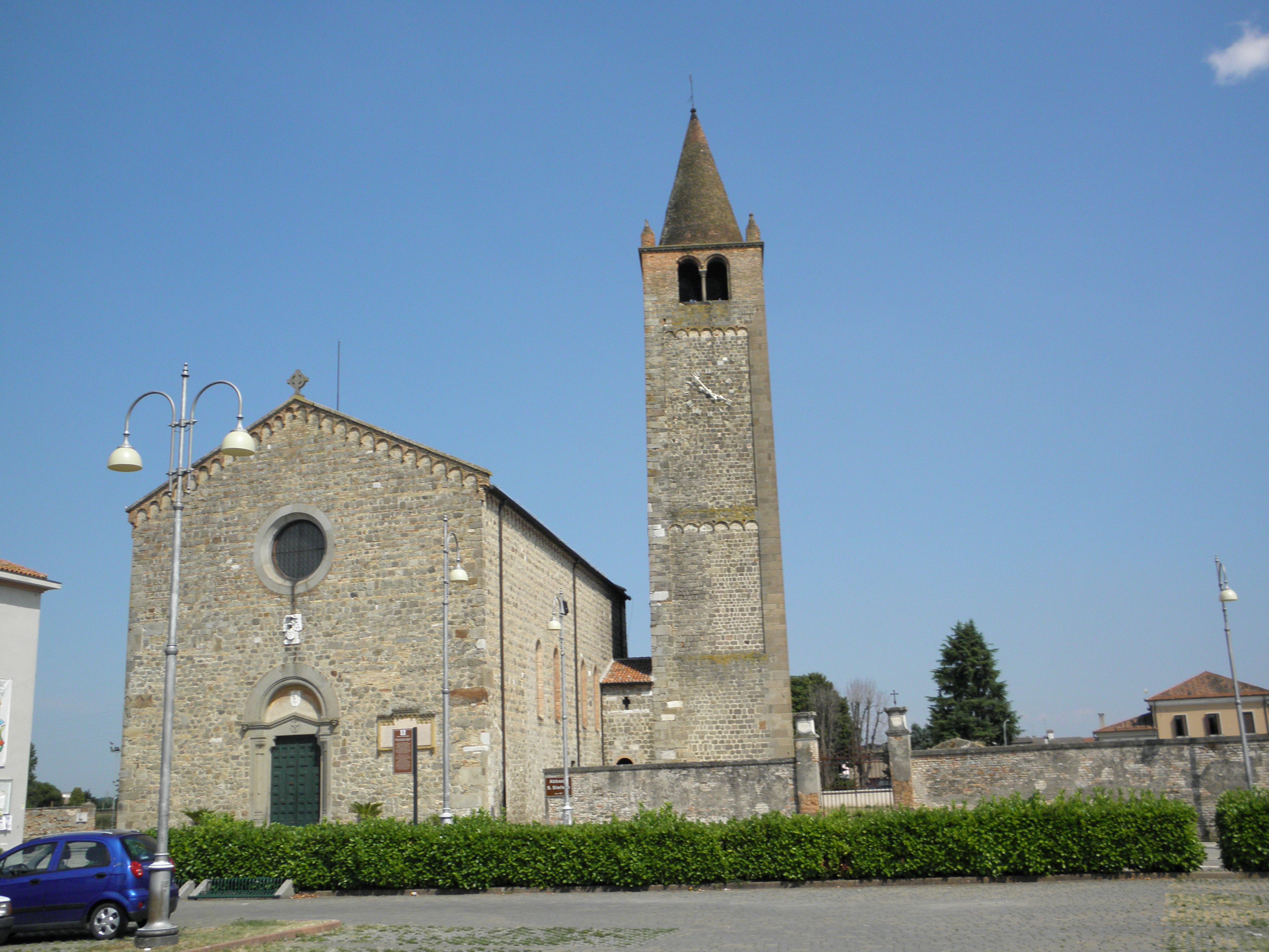 Carrara Santo Stefano, frazione di Due Carrare: la chiesa di Santo Stefano primo martire, già parte dell'abbazia benedettina di Santo Stefano di Carrara.